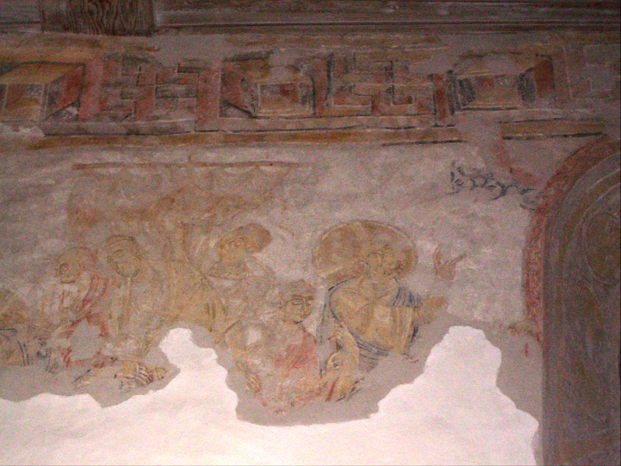 Überlingen, Germany: Kapelle St. Sylvester in Goldbach